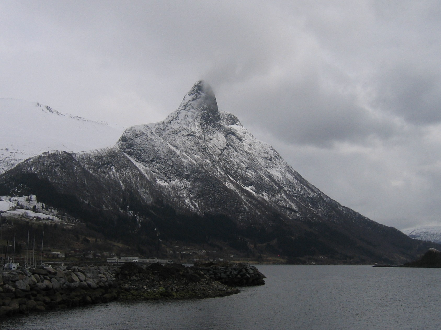 Liadalsnipa,Ørsta,Norway